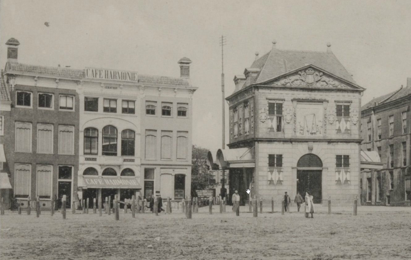 Markt in Gouda met v.l.n.r. Harmonie, bankgebouw van Goedewaagen en de Waag (uitsnede uit een grotere afbeelding)